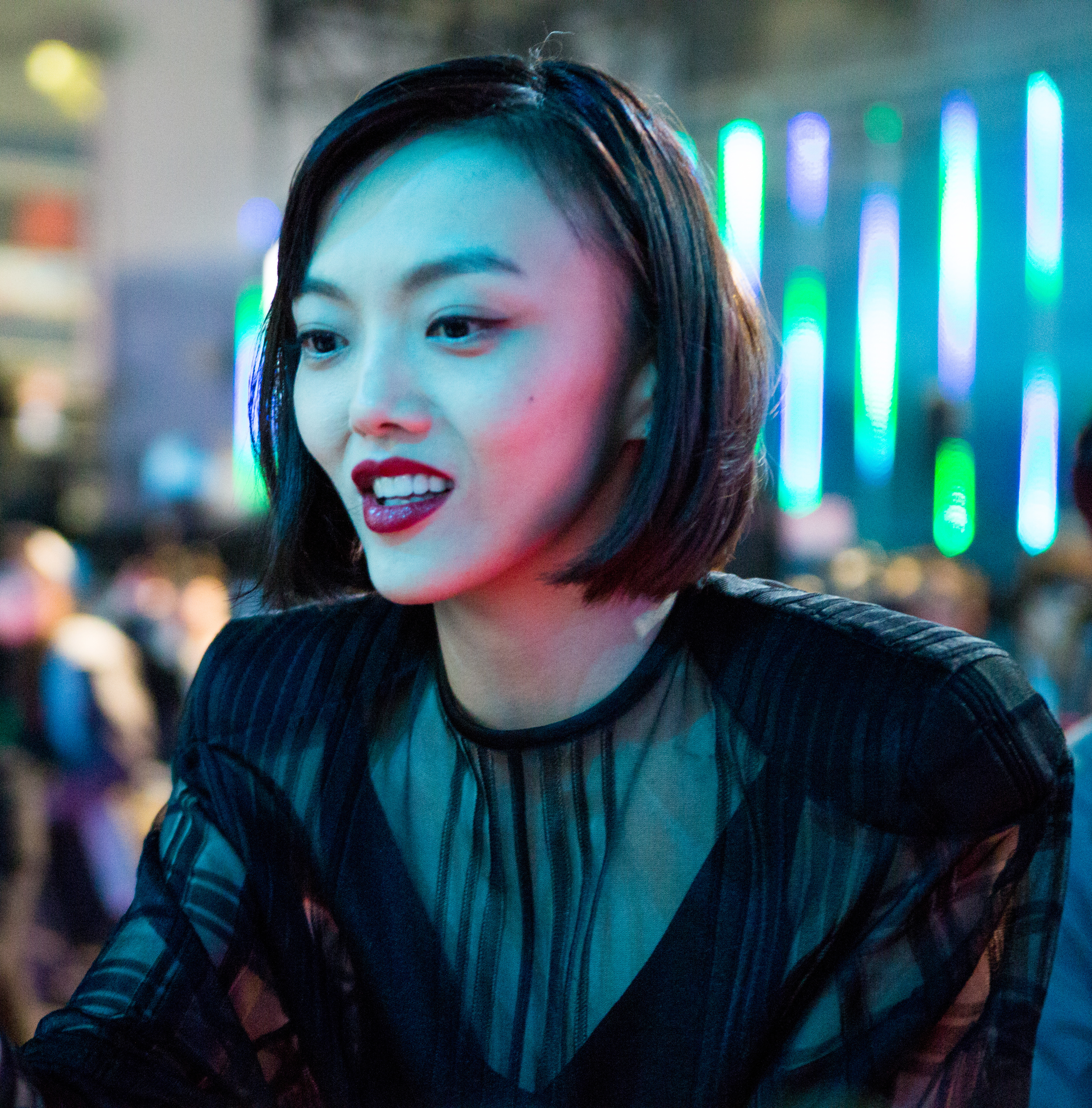 ゴースト・イン・ザ・シェル ワールドプレミアレッドカーペット 福島リラ